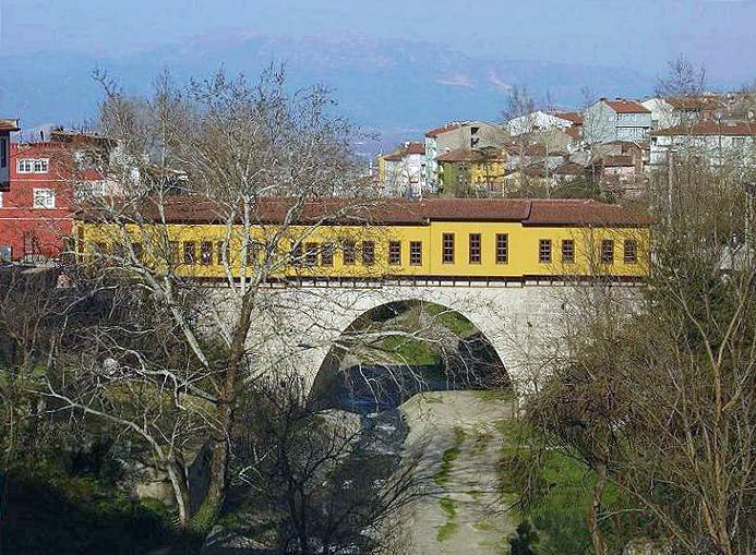 Irgandı Köprüsü